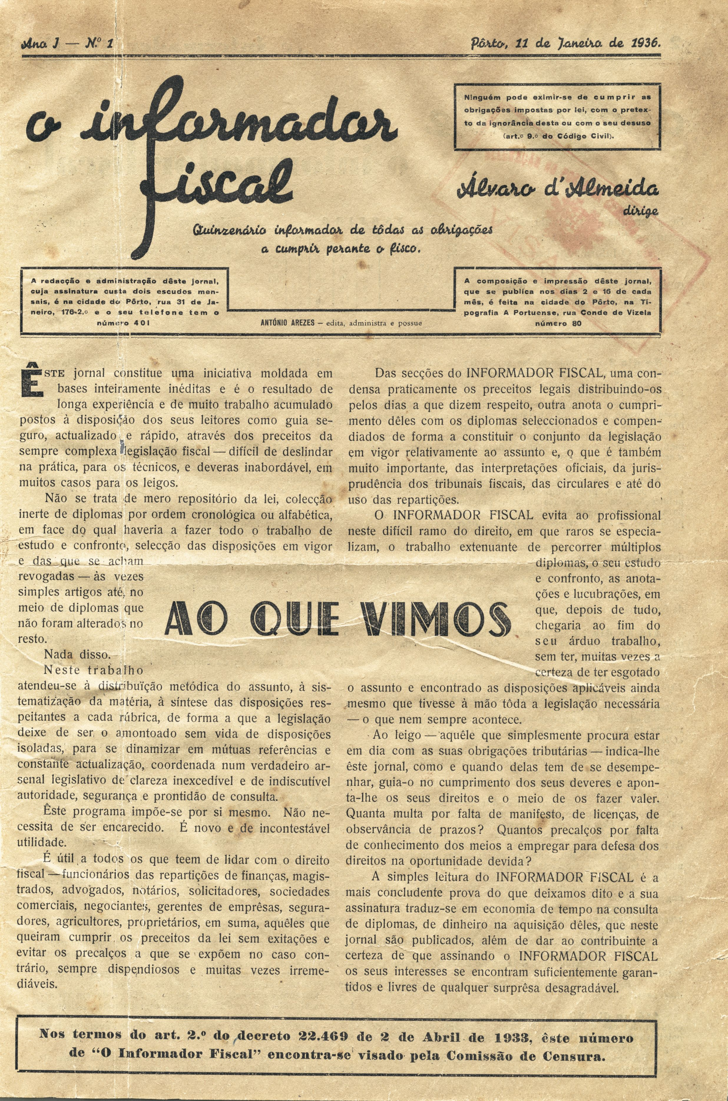 1ª Edição do jornal O Informador Fiscal, datado de 11 de Janeiro de 1936.